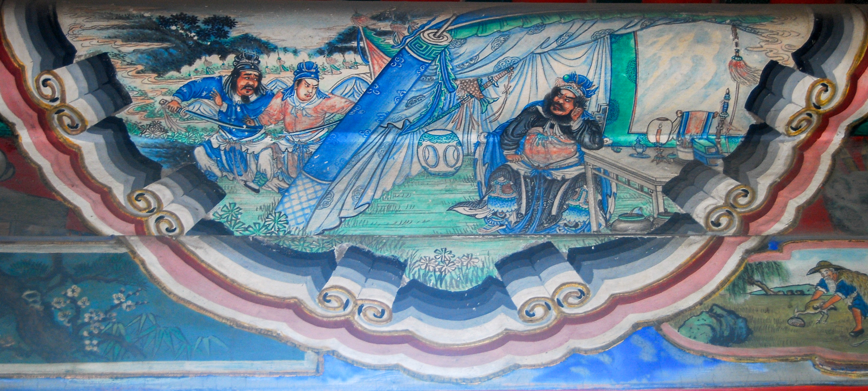 Trương Phi bị hại - Di Hòa Viên